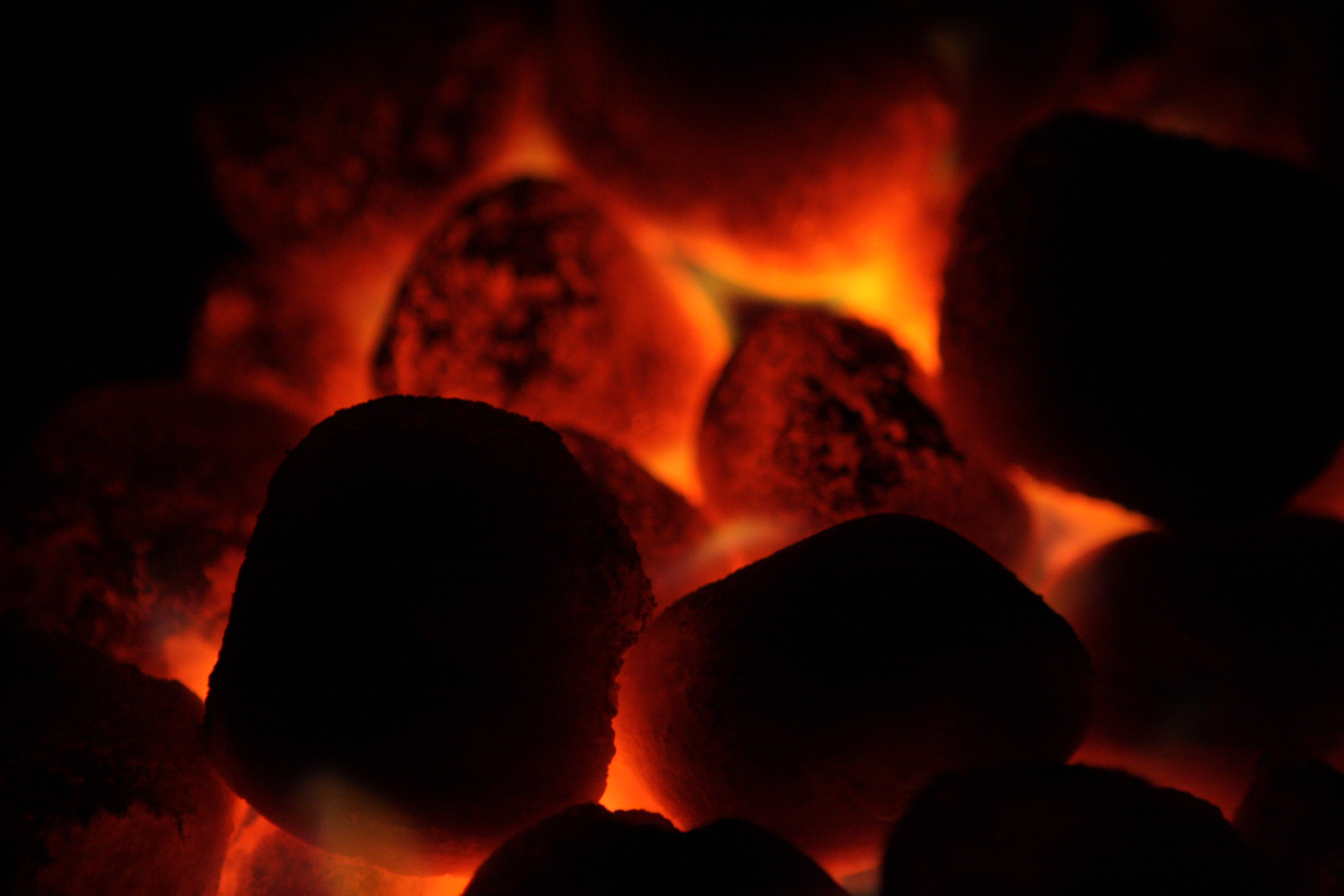 Glut eines Holzkohlebrikettfeuerts